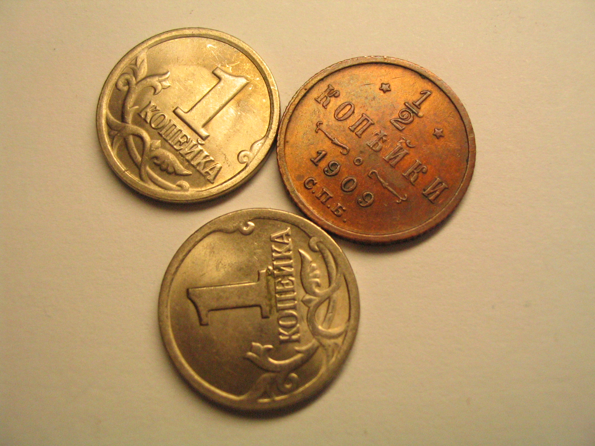 Медные пол-копейки 1909 года рядом с современными монетами